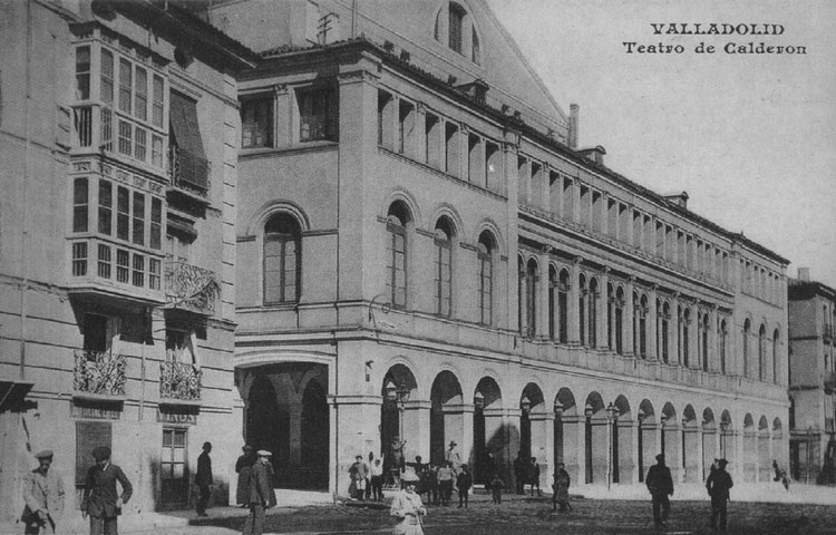 Teatro Calderón - Valladolid - Colección Valladolid, postales para el Recuerdo, editada por el Diario El Mundo de Valladolid. Teatro de Calderón. - Fotografía. Papel 140 x 90 B/N